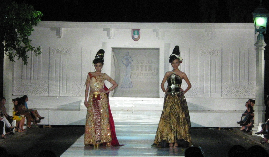 Solo Batik Fashion 2011